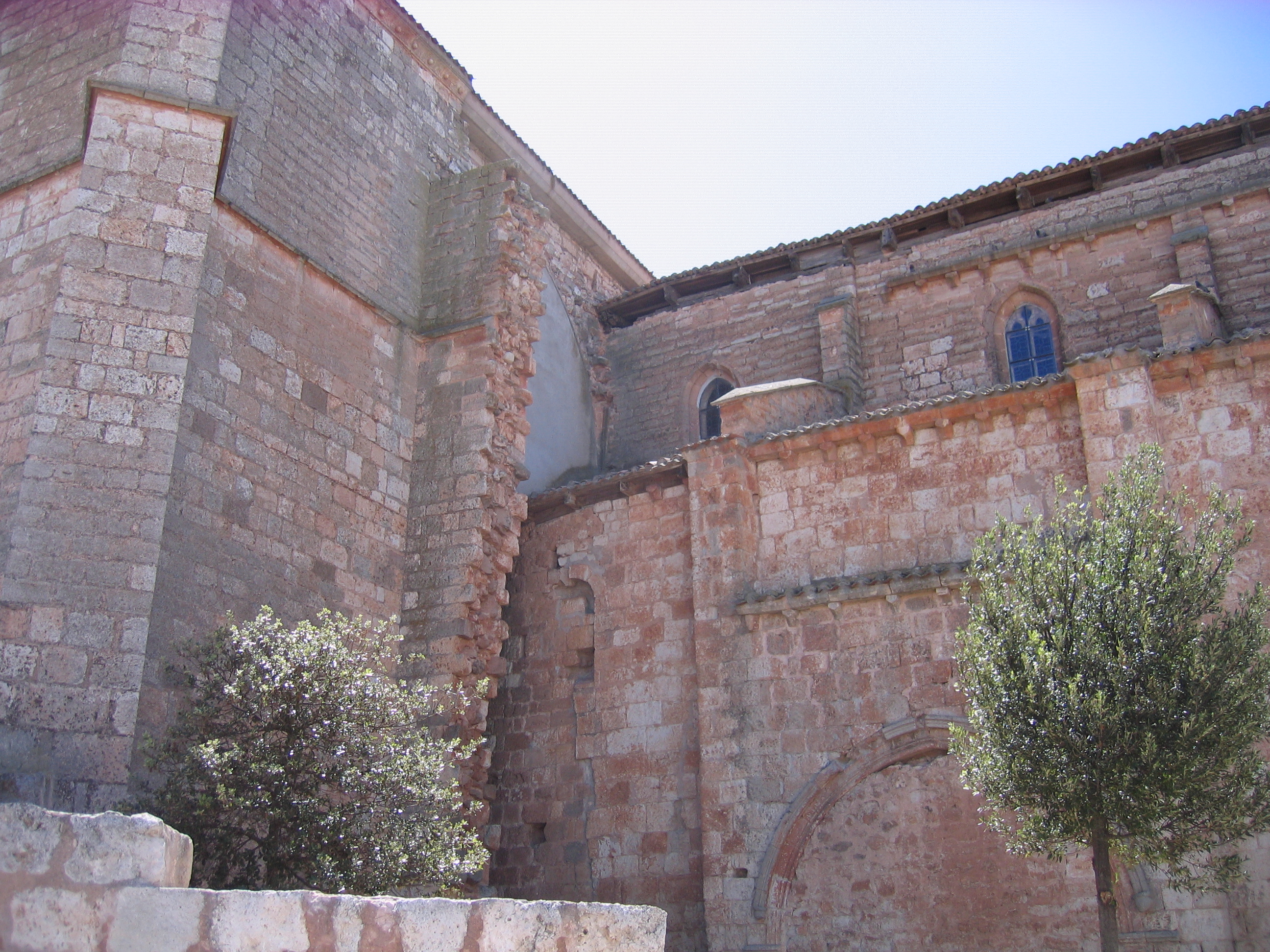 Vista sur de la iglesia de San Miguel de Mahamud. Se observan los efectos del terremoto de Lisboa de 1755